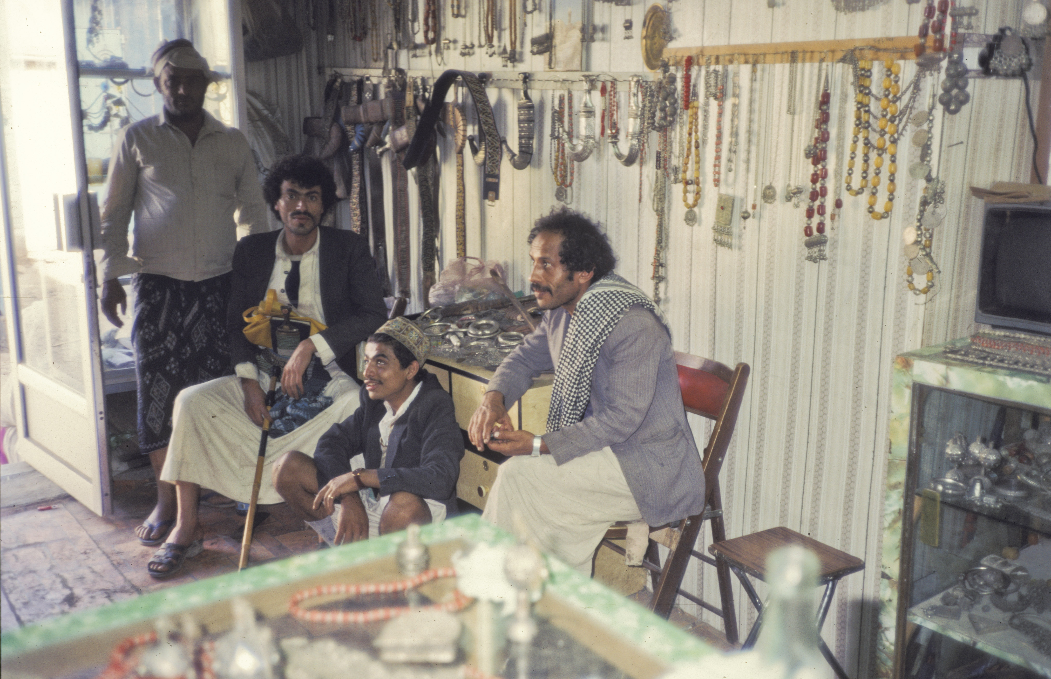 Yemen